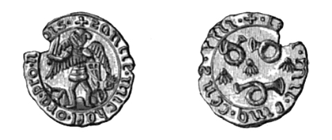 Dessin d'un méreau de la corporation des oublieurs, 1508